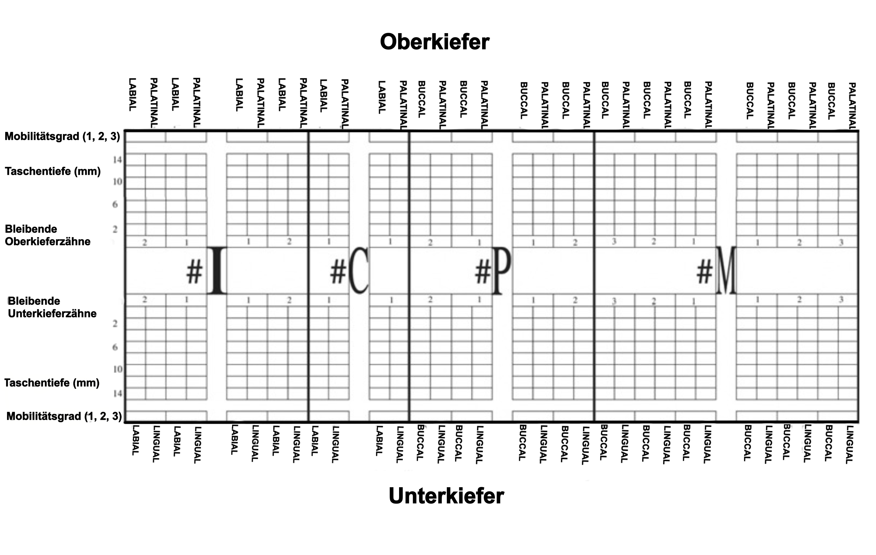 Befundung im MIPAC-Zahnschema